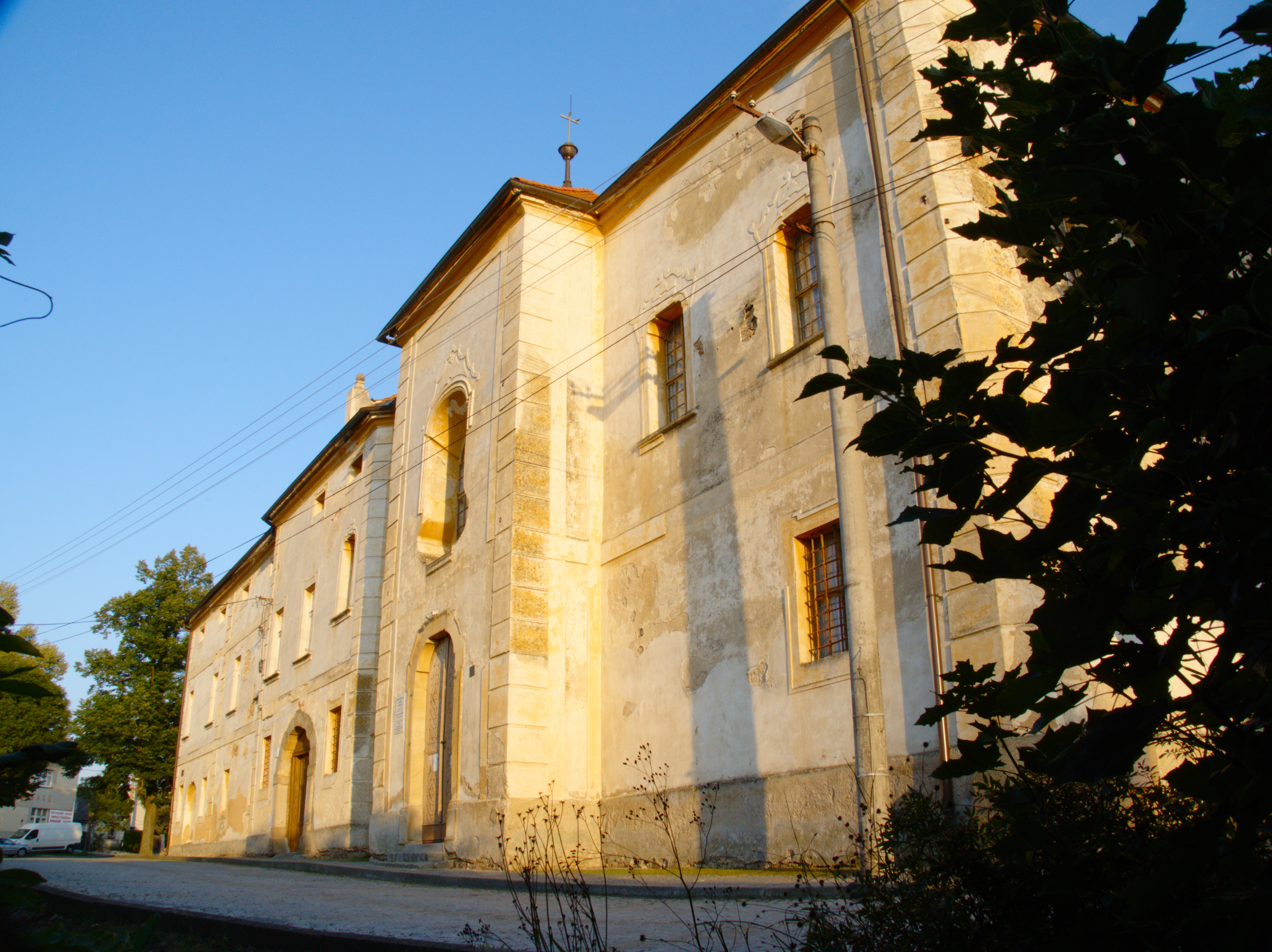 Pohled z ulice od SZ